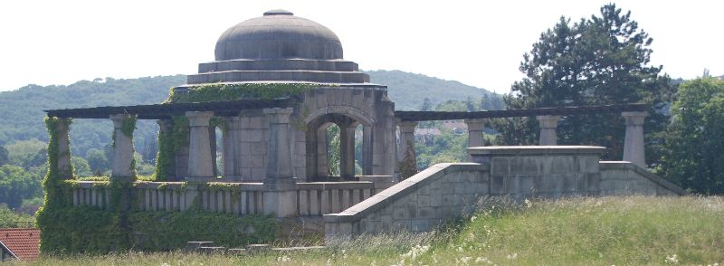 Die Rückseite beziehungsweise Oberseite des Trinkwasserbehälters Hackenberg auf dem gleichnamigen Hackenberg in Wien-Döbling